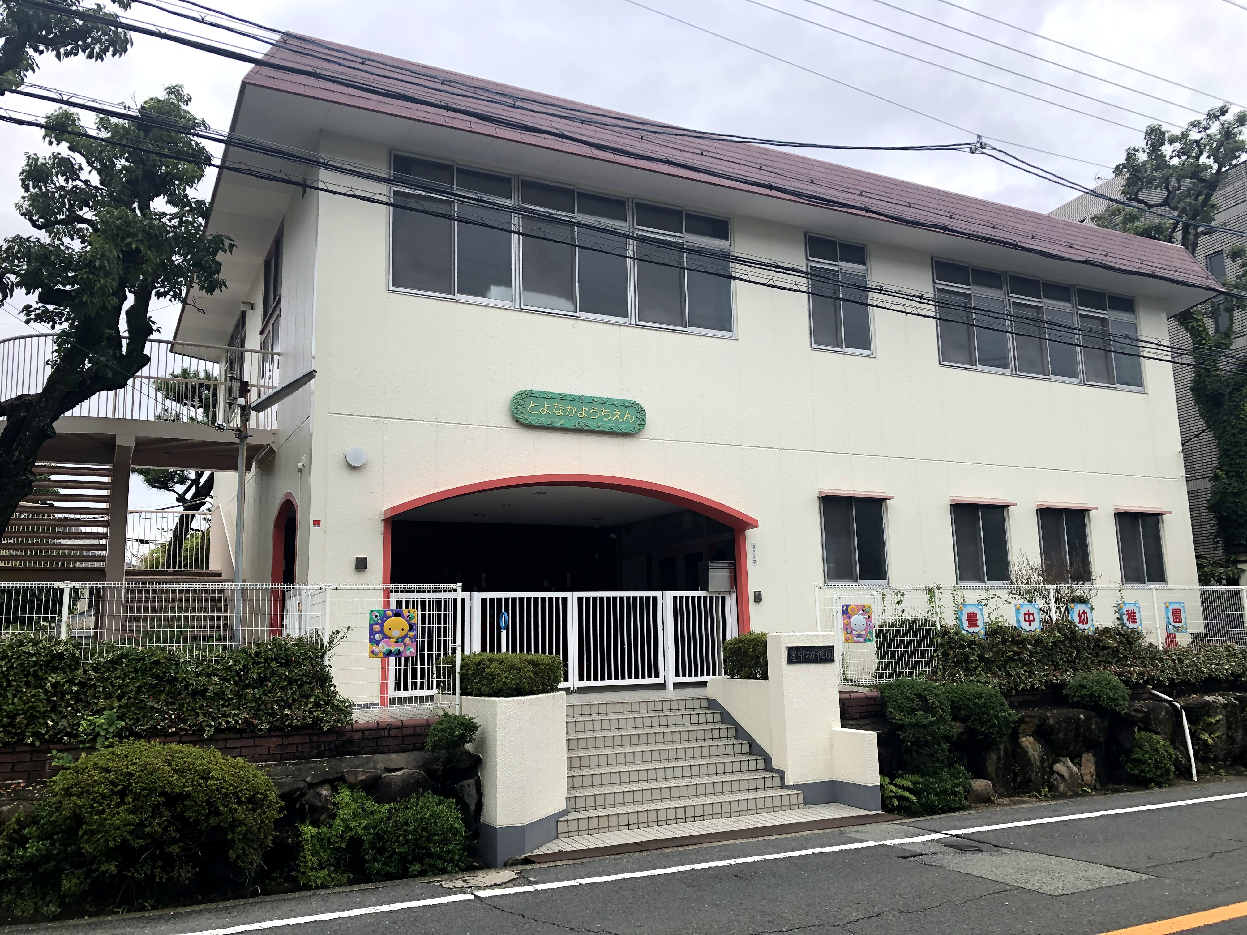 豊中幼稚園の園舎